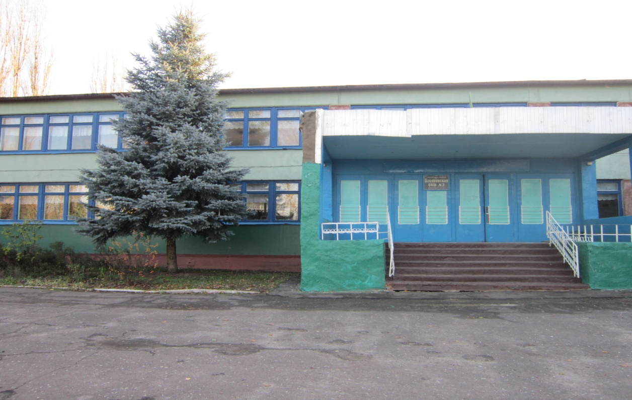 МКОУ «Бабяковская СОШ № 2»